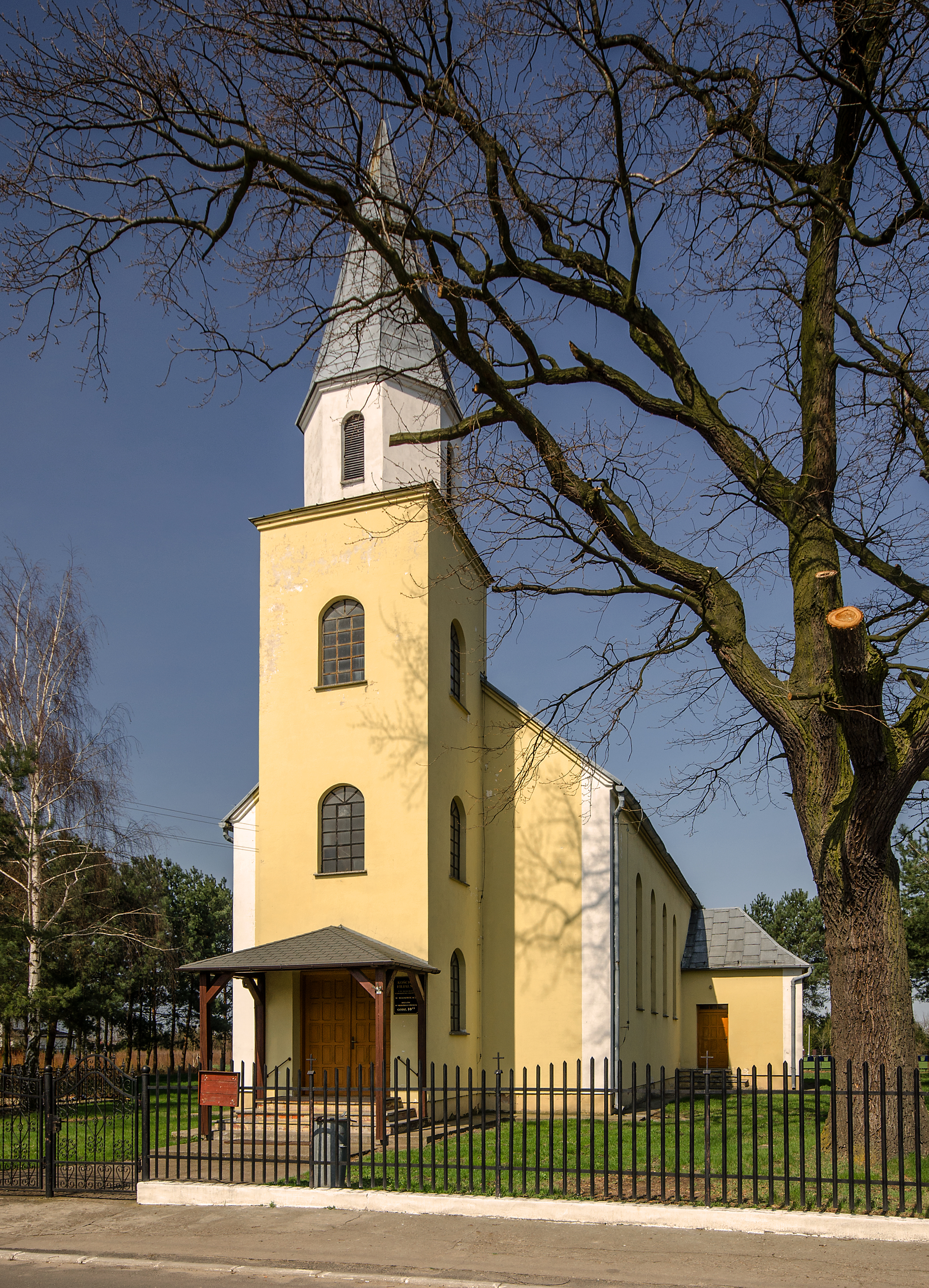 Kościół Matki Bożej Wspomożenia Wiernych w Stanowicach, woj. dolnośląskie, pow. oławski, gm. Oława